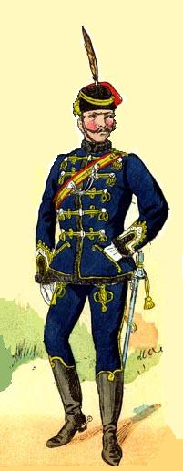 Offizier des k.k. Husaren-Regiments Graf Radetzky Nr. 5 (1865)